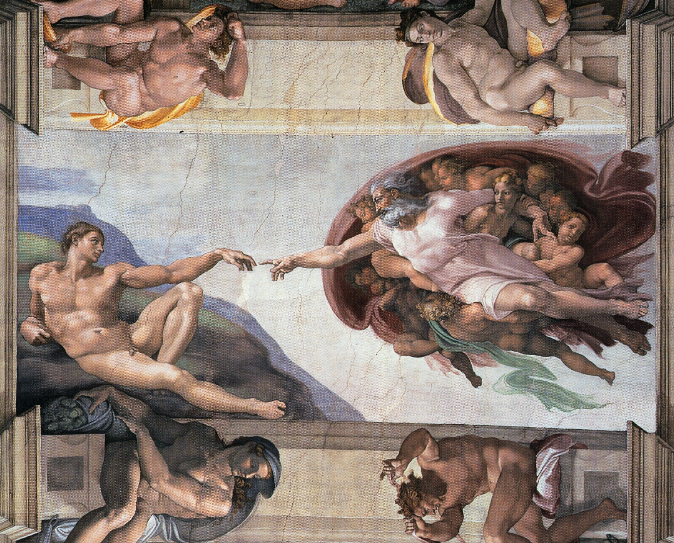 after restoration